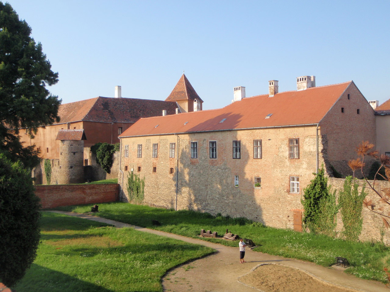 Güns Stadtmauer und Burg aus Burgring